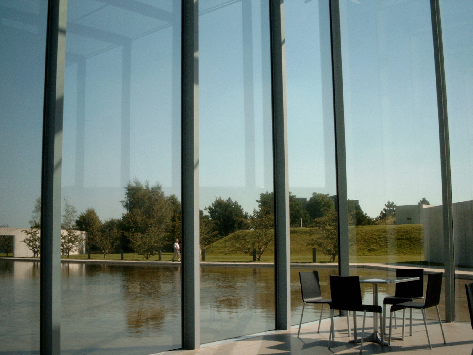 Stoel 0.3 Vitra van Maarten Van Severen in het Museum Langen Foundation bij Insel Hombroich te Neuss, Duitsland Stuhl 0.3 van Maarten Van Severen im Museum der Langen Foundation (Stiftung Langen) auf der ehemaligen NATO-Raketenstation in der Nähe der Museumsinsel Hombroich bei Neuss, Deutschland